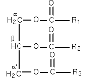 Triglycéride. avril 2005 Création personnelle.